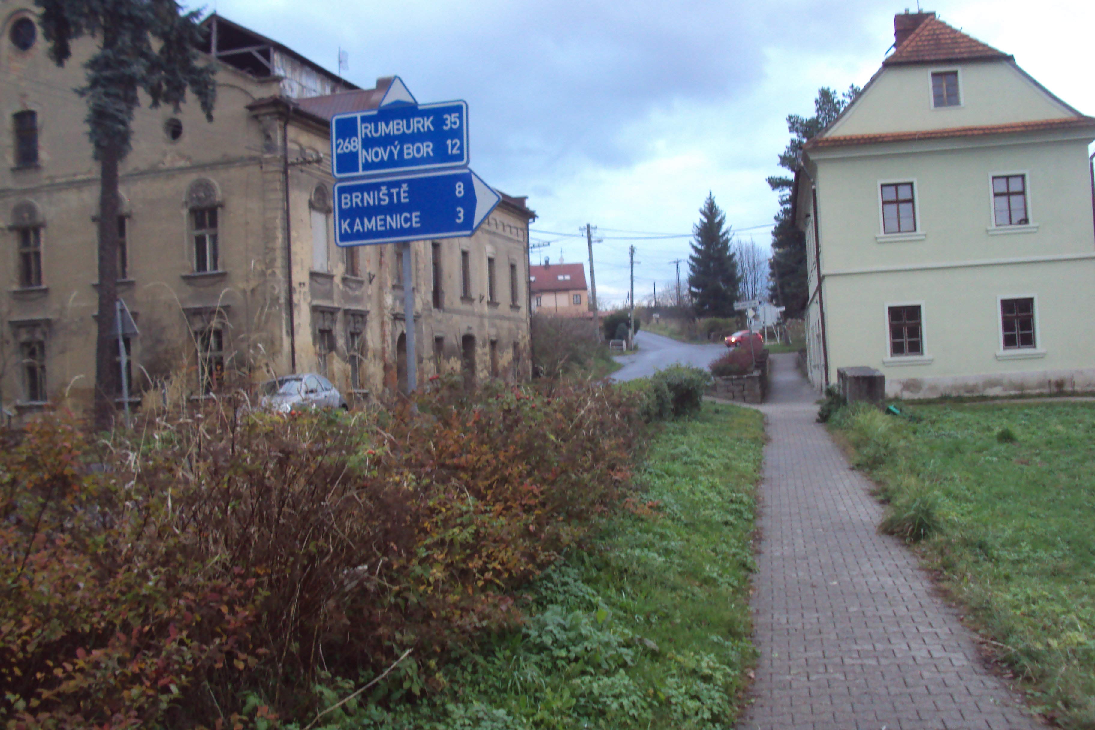 Tabule v Borské ulici v Zákupech